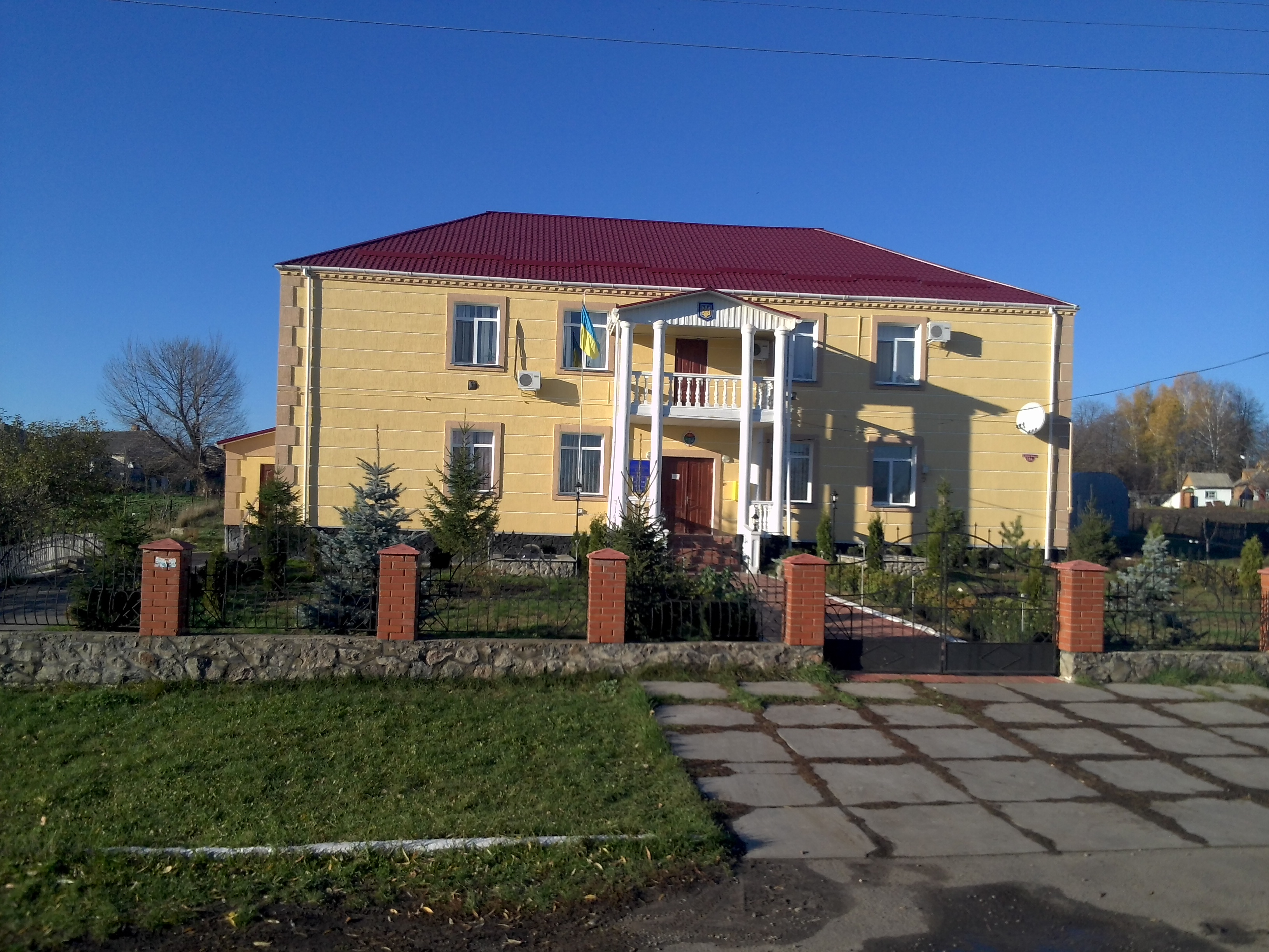 с. Росоша. Сільська рада